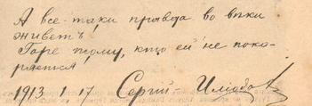 Автограф бывшего иеромонаха Илиодора Труфанова